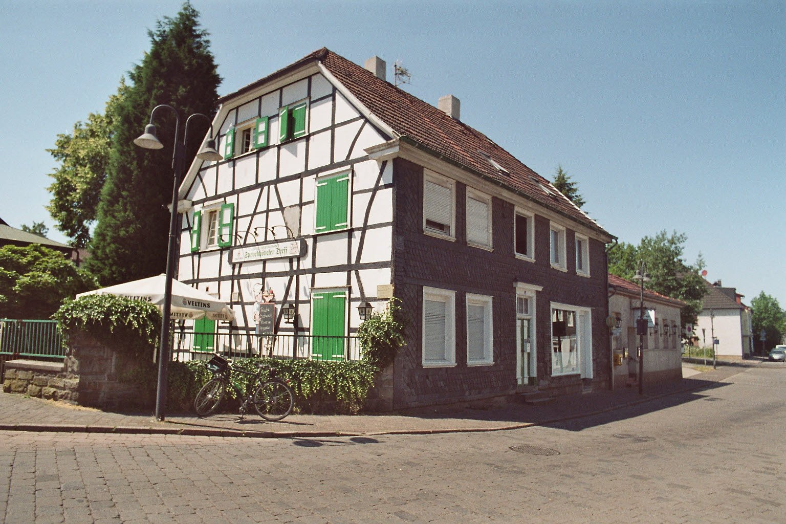 Haus Heine, Hauptstr. 4, Sprockhövel (Niedersprockhövel), Deutschland, zeitweilige Wirkungsstätte von Henriette Davidis